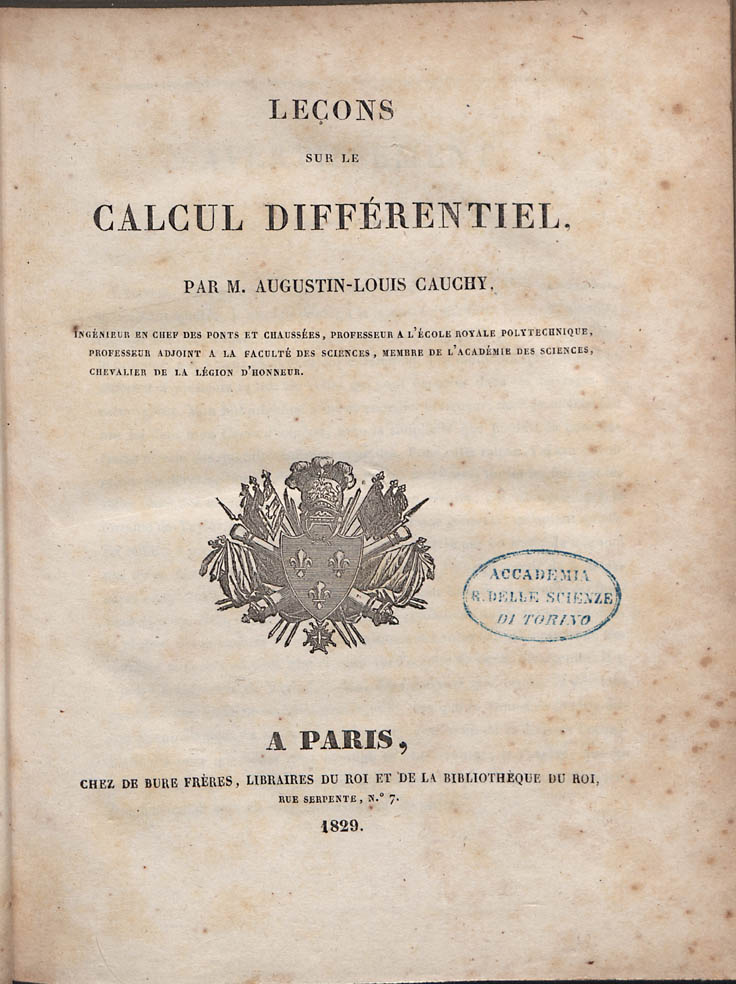 Leçons sur le calcul différentiel, par m. Augustin-Louis Cauchy... - A Paris : chez De Bure freres, libraires du roi et de la bibliothèque du roi, rue Serpente, n. 7, 1829 ([Parigi] : imprimerie de Bethune, Hotel Palatin, pres Saint-Sulpice). - [8], 289, [3] p. ; 4º . Frontespizio